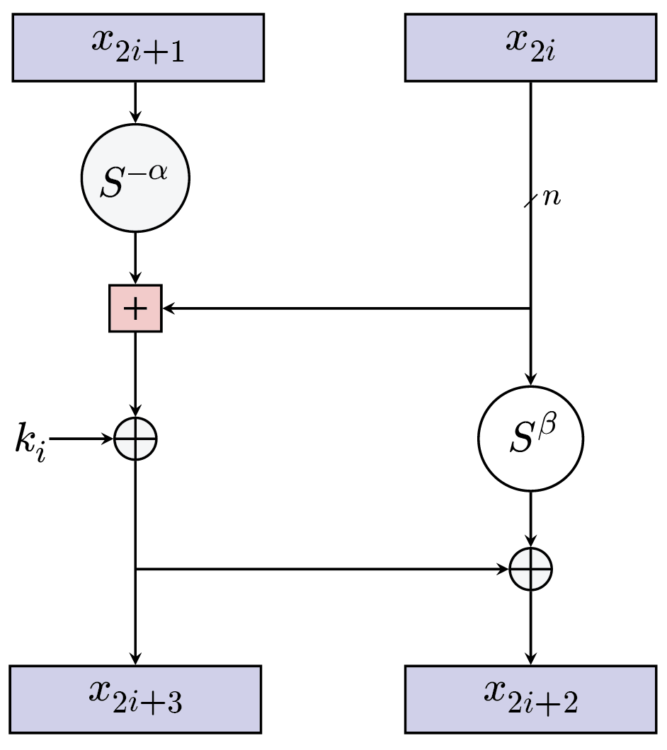 תיאור הפונקציה הפנימית של צופן Speck